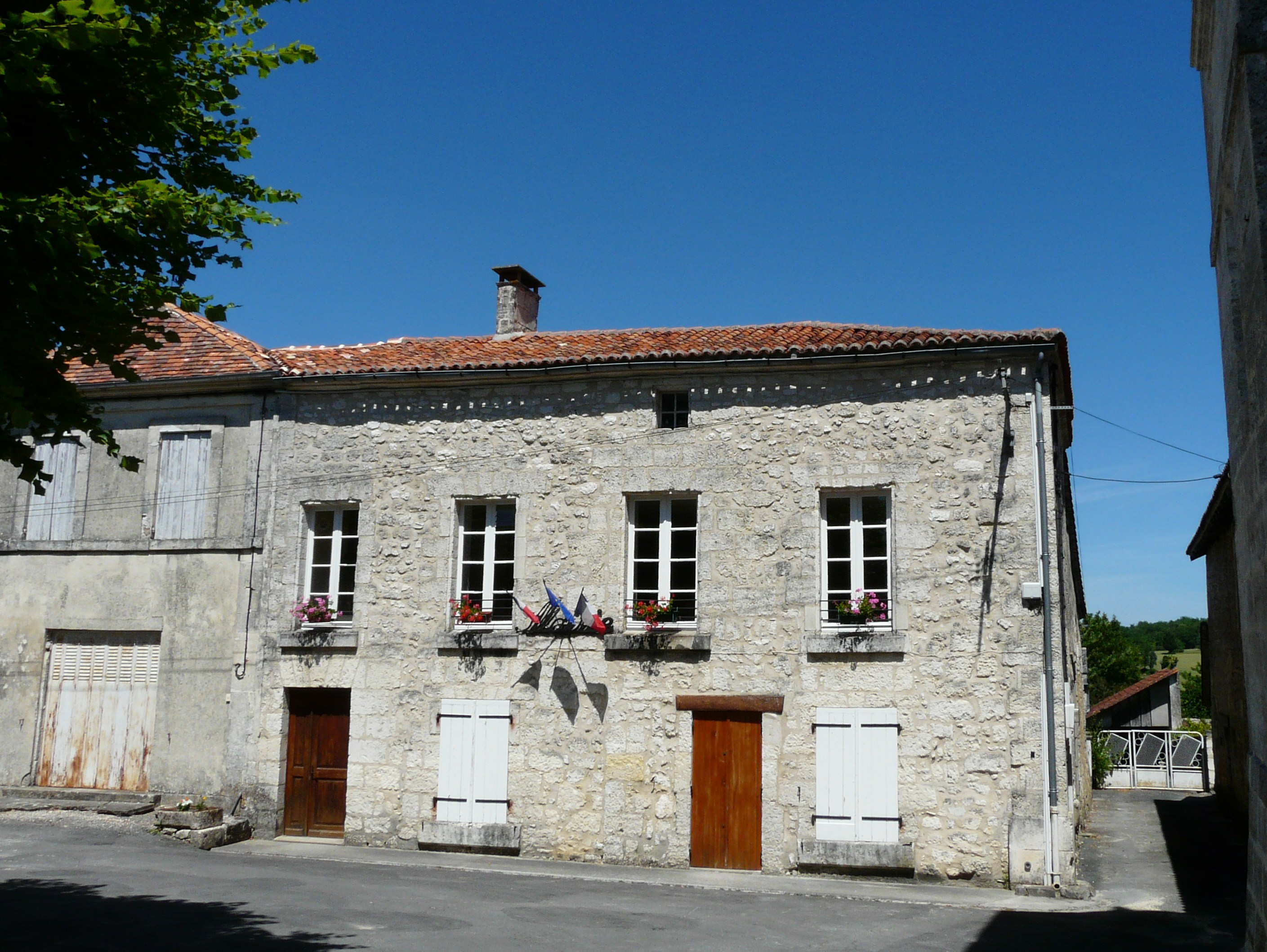 La mairie de La Tour-Blanche, Dordogne, France.